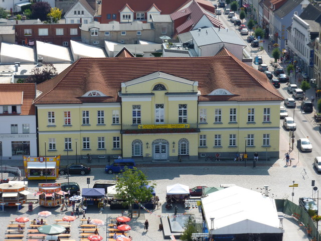 Ribnitz: Blick von der Marienkirche aufs Rathaus